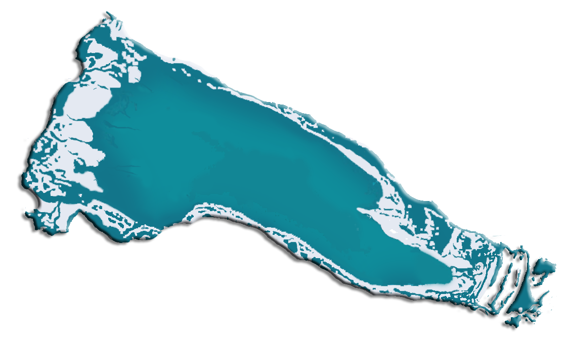 Mapa de la Laguna Kalina o Busch, del departamento de Potosí, Bolivia.